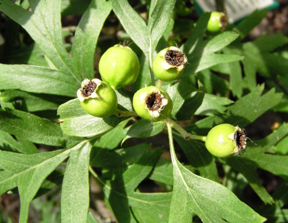 Azaroldorn